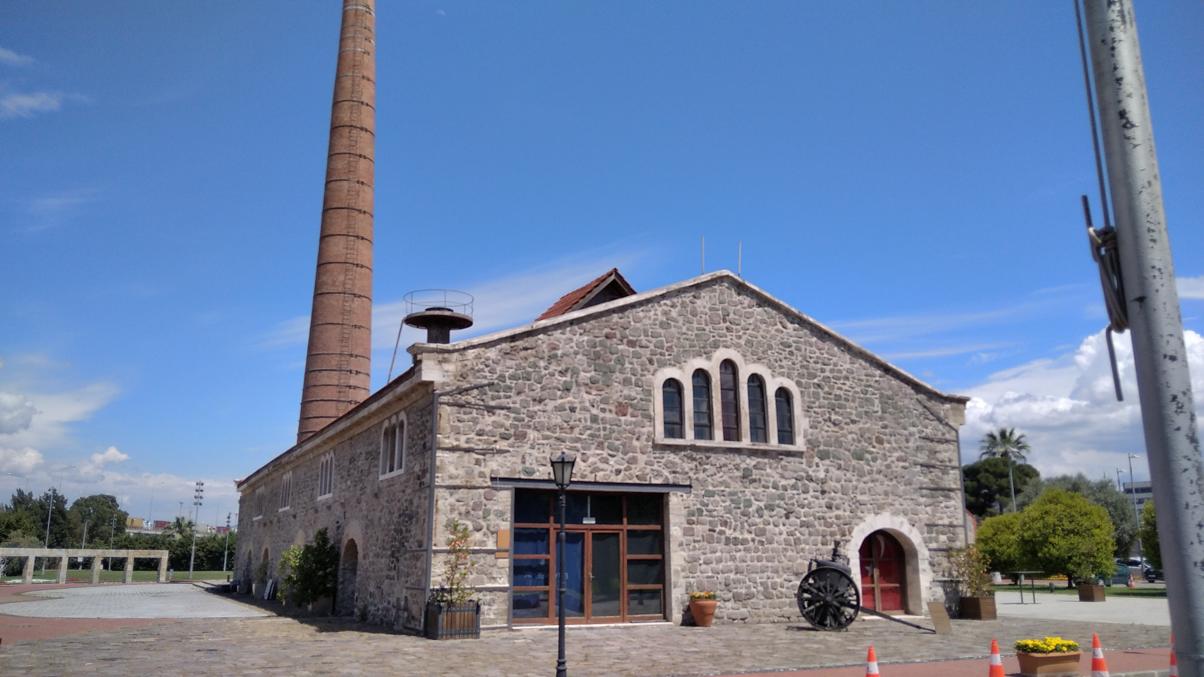 Tarihî Havagazı Fabrikası Kültür Merkezi